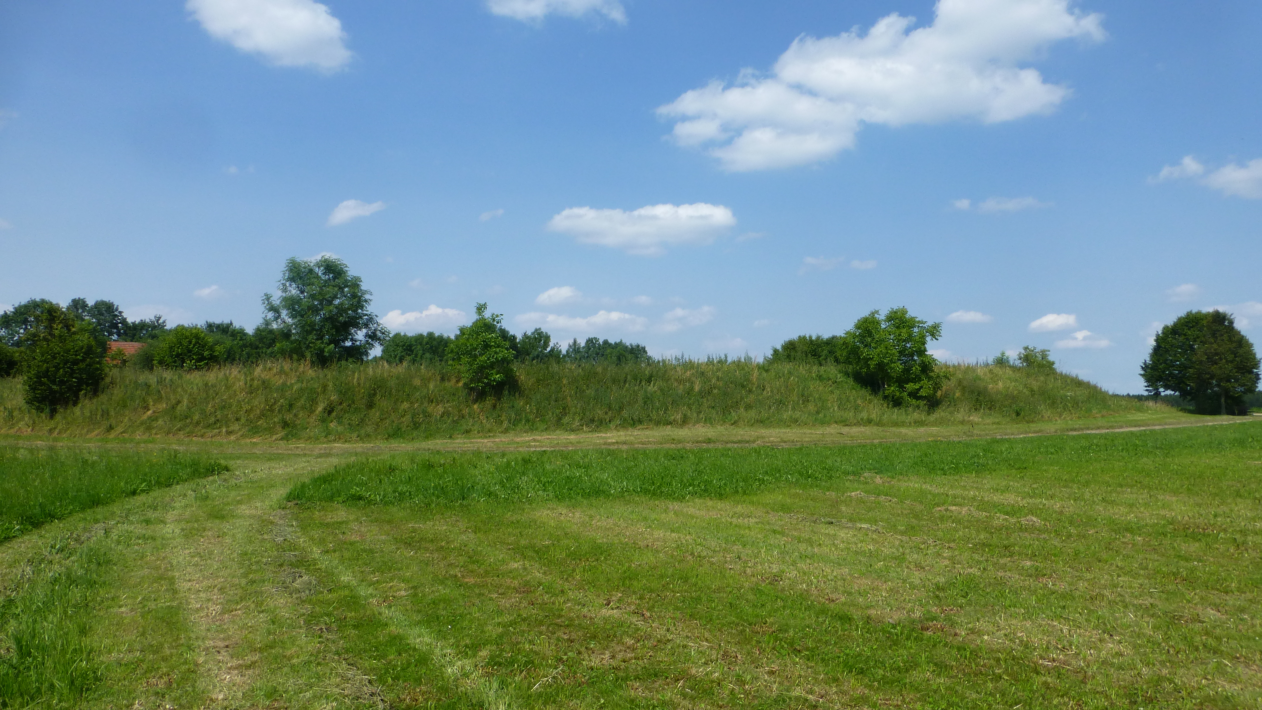 Wall um das Schloss Emmenhausen, von Südwesten aus fotografiert